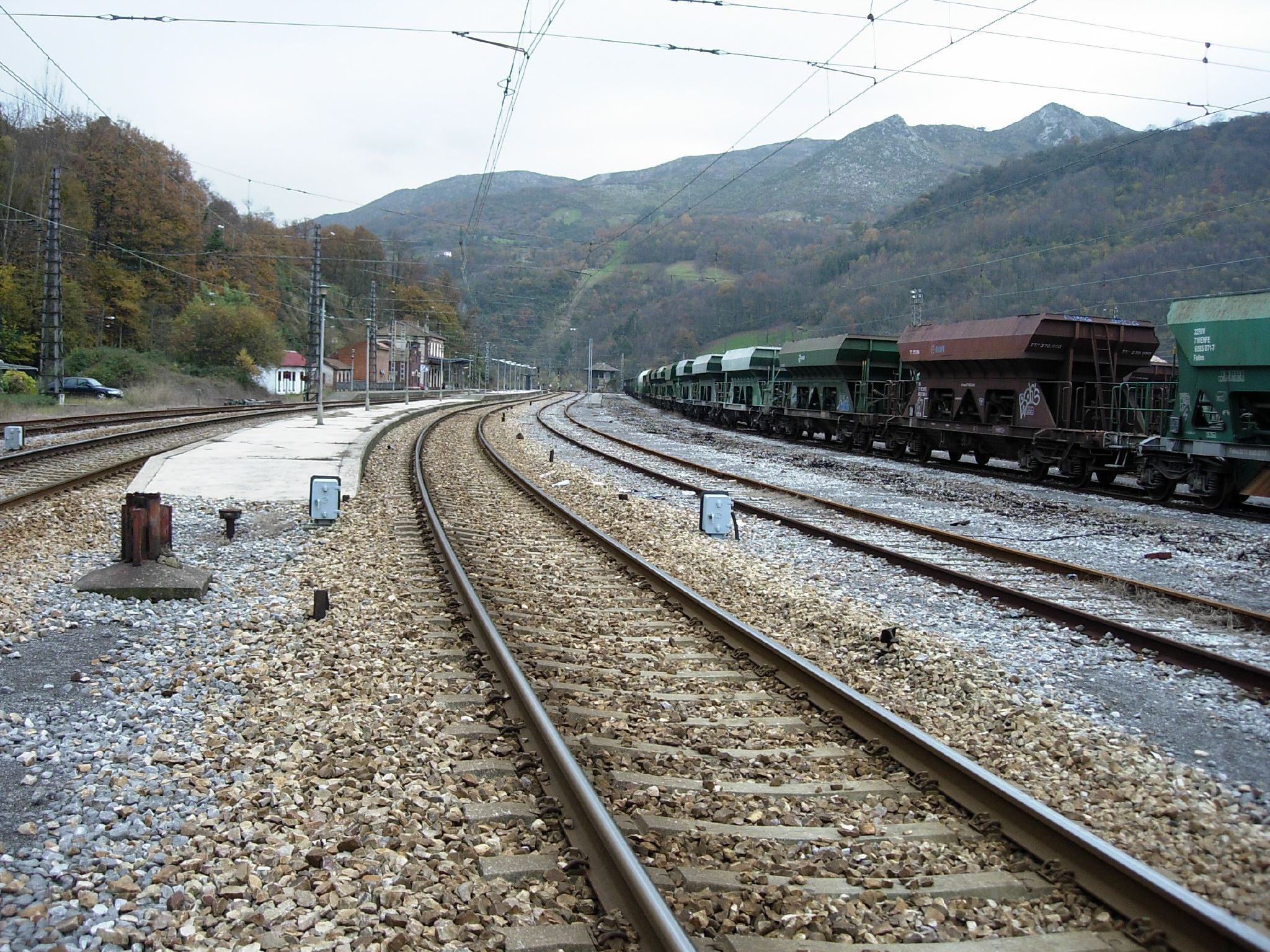 Estación de Soto de Rey (Soto de Rey, Ribera de Arriba, Principado de Asturias).